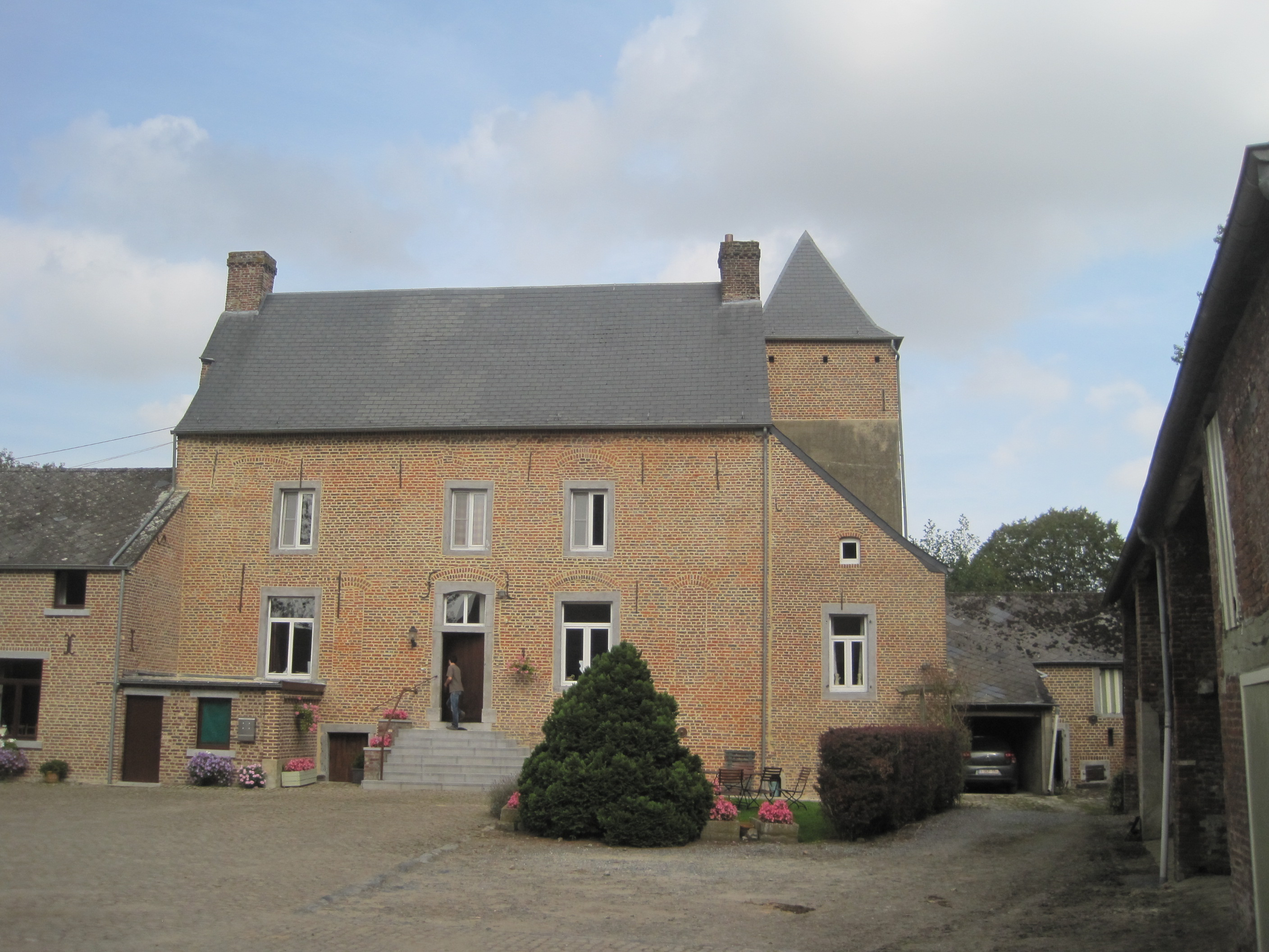 La totalité de la Grange sis rue du Gros chêne, n°1 à Liernu (M) ainsi que l'ensemble formé par celle-ci et les terrains environnants (S)